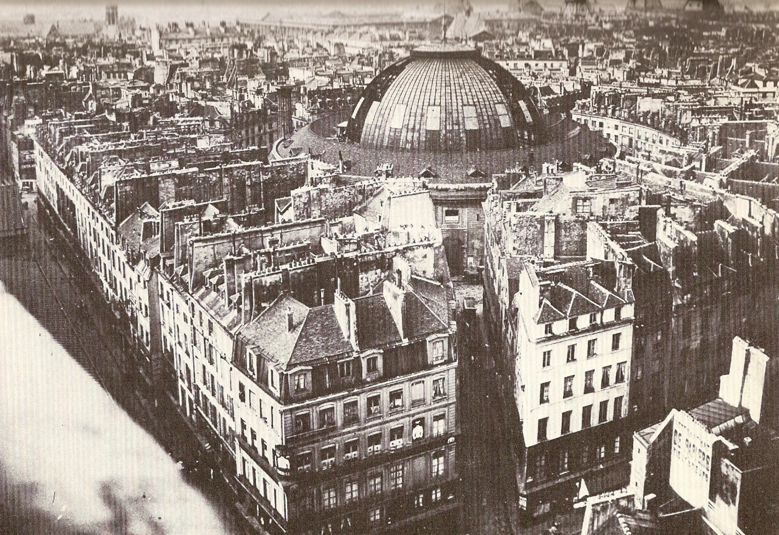 Paris - Vue panoramique du quartier de la Halle au blé (actuelle Bourse de commerce) prise depuis Saint-Eustache.